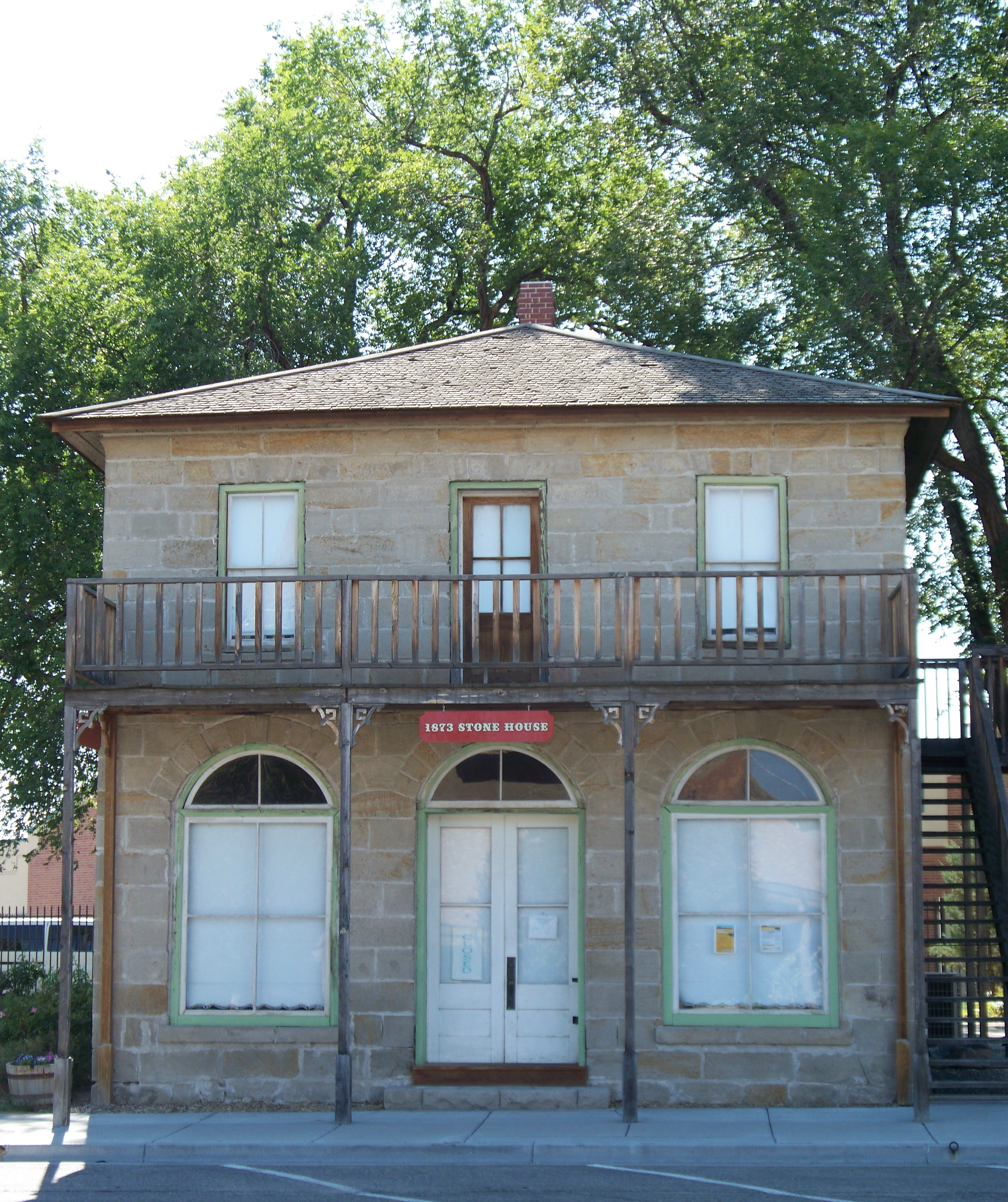 Stone House, Vale, OR